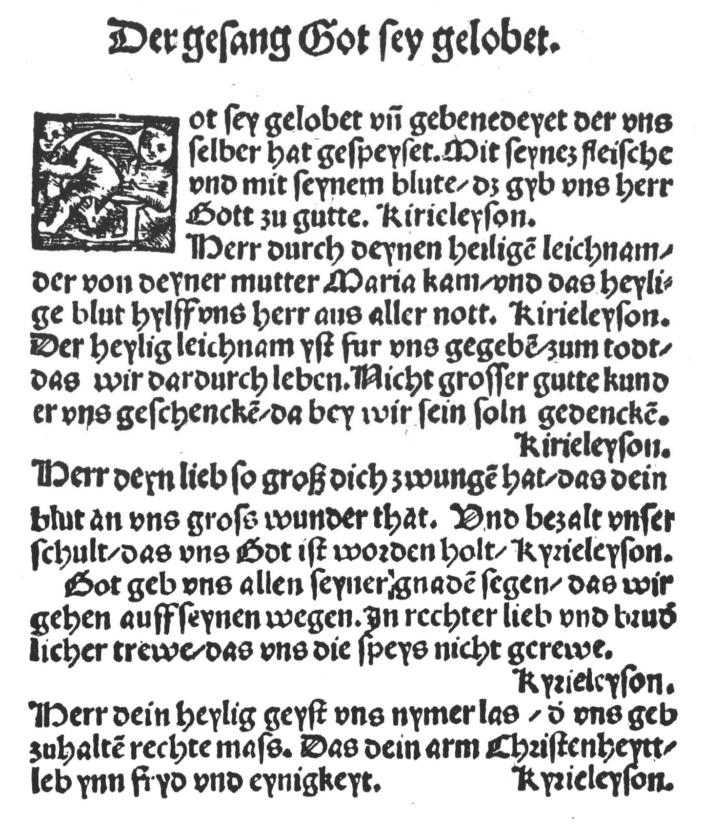 Got sey gelobet und gebenedeyet, Abendmahlslied, Urtext 1524